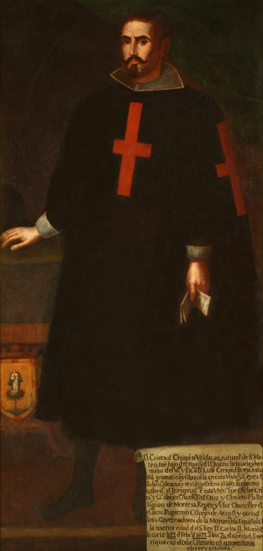 Retrato del jurista y escritor español Cristóbal Crespí de Valldaura (1599-1671), que fue un juriscosulto valenciano y vicecanciller del Consejo de Aragón y también caballero de la Orden de Montesa y clavero de la misma. Obra situada en el Paranimfo de la Universidad de Valencia.